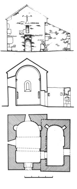 ბროწლეთის ეკლესიის გეგმა